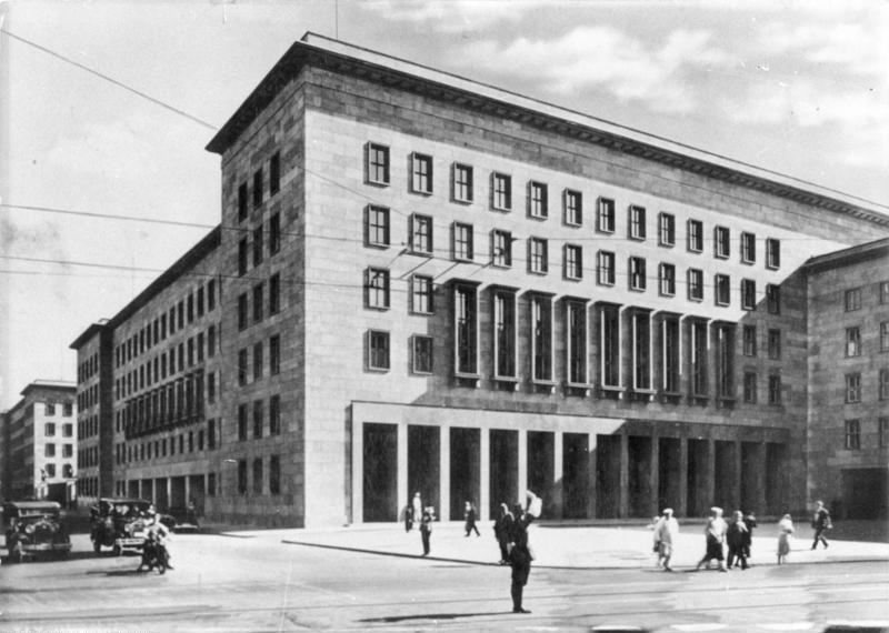 Zentralbild Berlin 1938 Reichsluftfahrtministerium in der Leipziger-Strasse. 2826-38